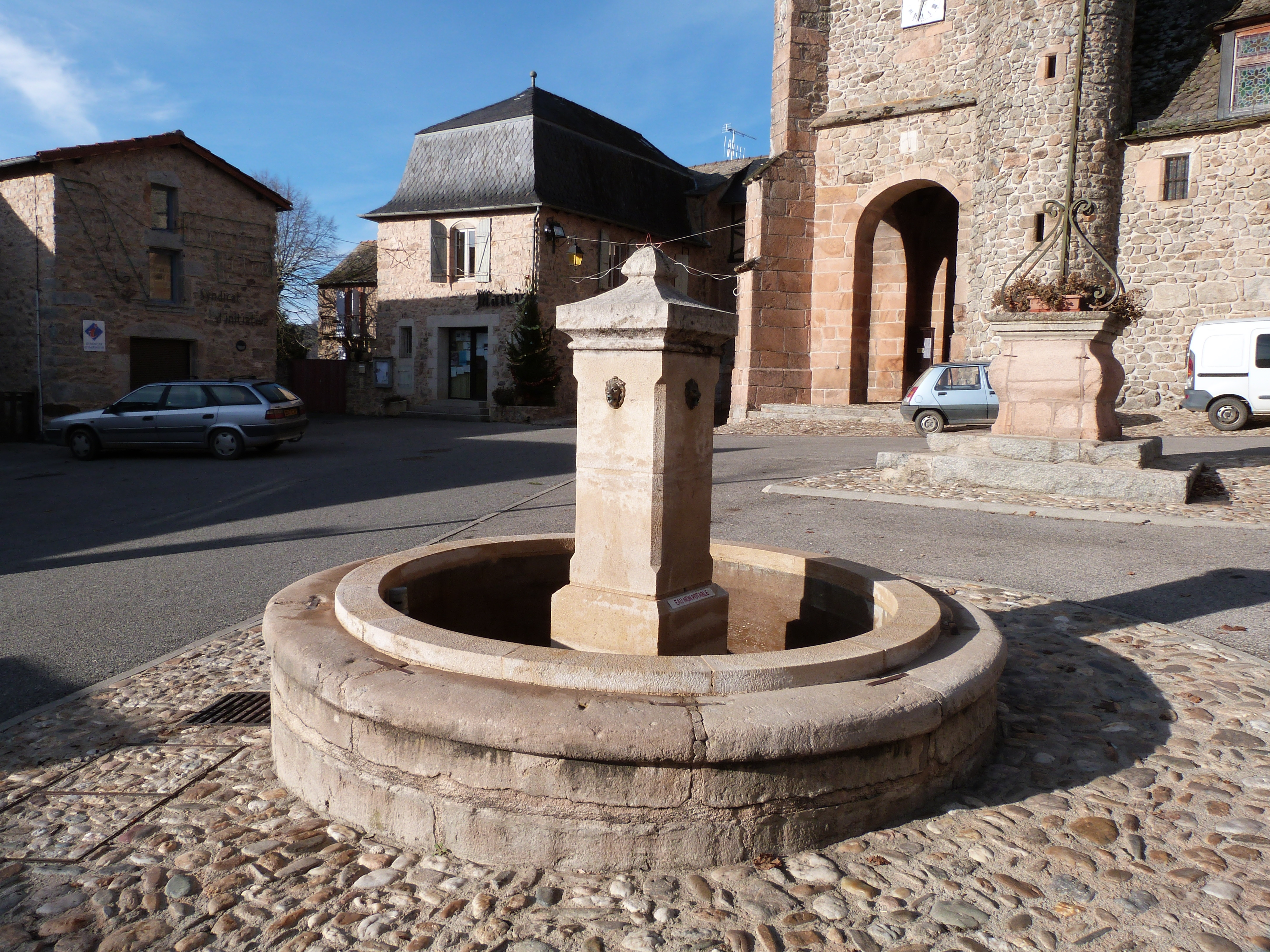 Fontaine se trouvant sur la place principale, la place de l'église de Saint Jean-Baptiste, à La Bastide-L'Evêque (Aveyron)